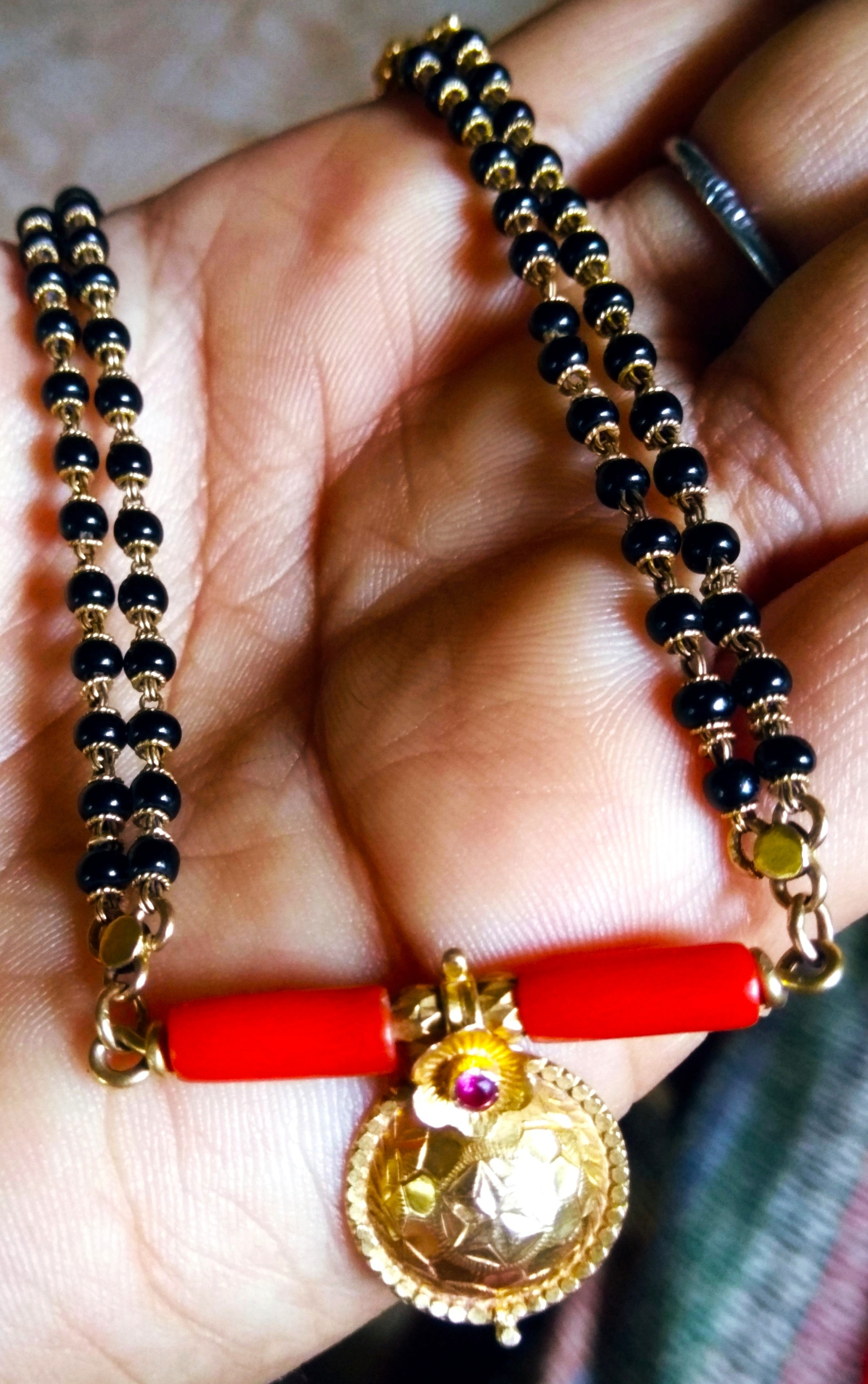 ಕನ್ನಡ: ಮಂಗಳಸೂತ್ರವು ಮದುವೆಯಲ್ಲಿ ಮದುಮಗನು ಮದುಮಗಳ ಕತ್ತಿಗೆ ಕಟ್ಟುವ ಪವಿತ್ರ ಕಂಠಹಾರ. ಅವಳ ವೈವಾಹಿಕ ಸ್ಥಿತಿಯ ಸಂಕೇತವಾಗಿ ಮಹಿಳೆಯು ಮಂಗಳ ಸೂತ್ರವನ್ನು ಧರಿಸುವುದನ್ನು ಮುಂದುವರಿಸುತ್ತಾಳೆ.